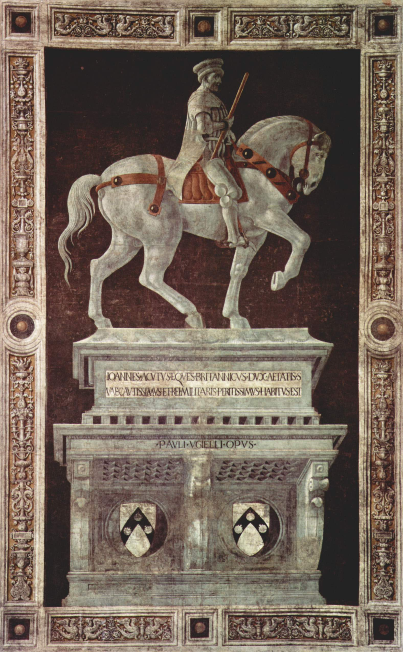 Auftraggeber: Signoria von Florenz, zu Ehren des Condottiere Giovanni Acuto (Übersetzung des Namens), Reiterstandbild nach sienesischem Vorbild, Porträt